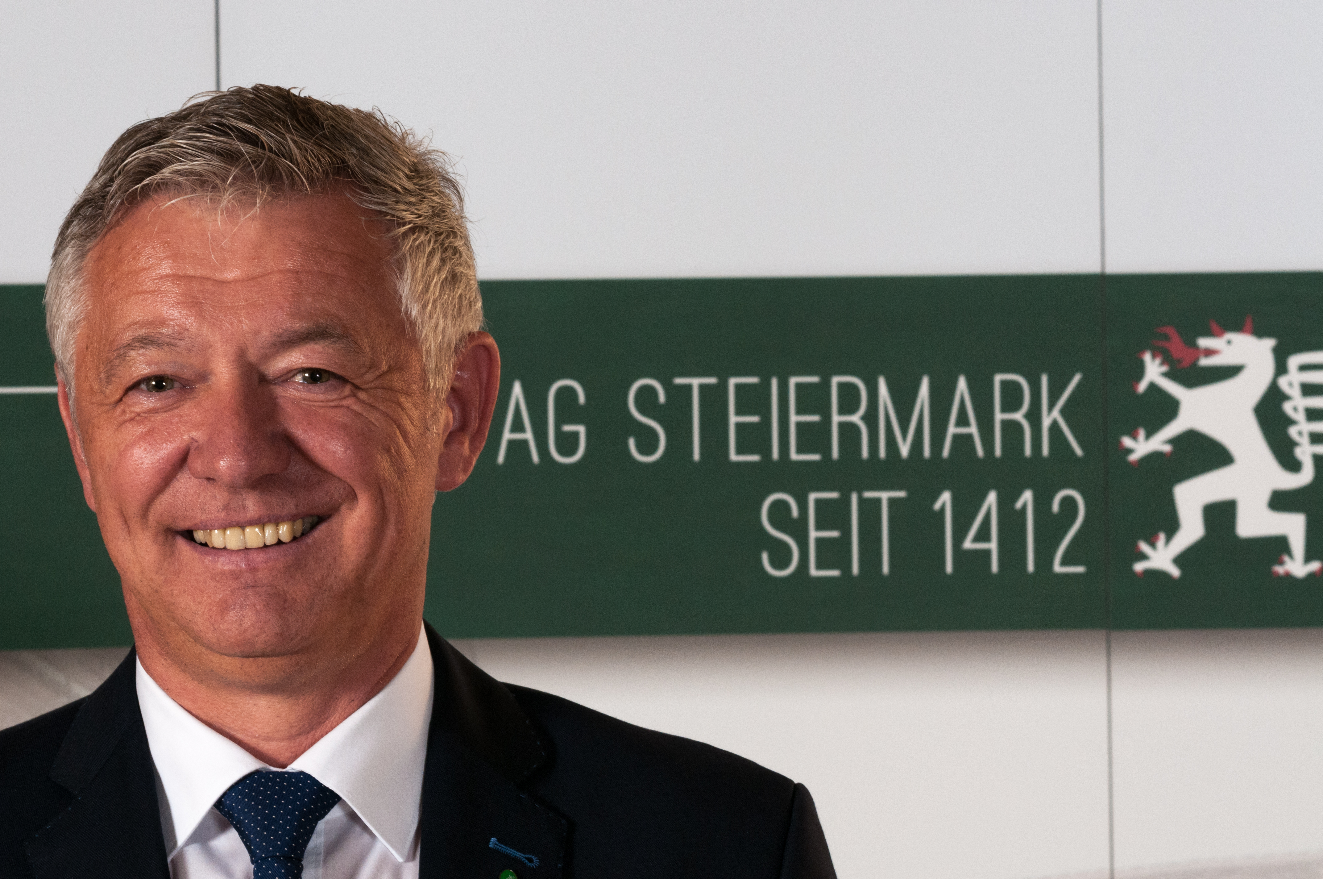 Landtagsprojekt Steiermark